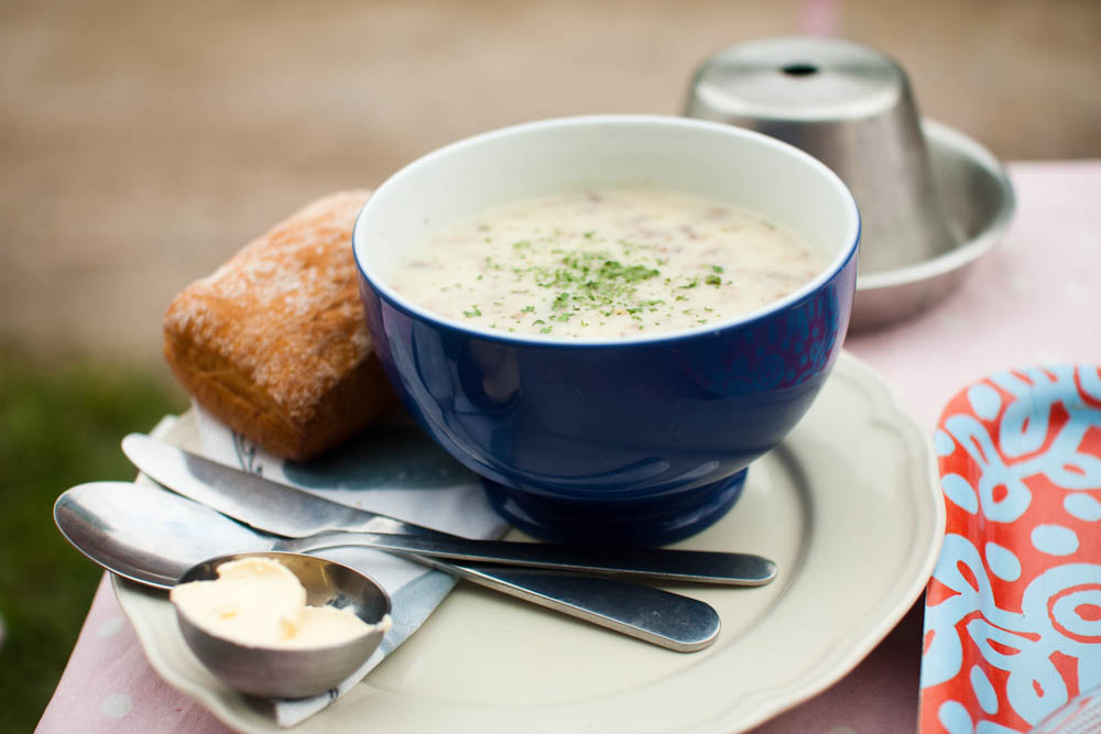 Reindeer cheese soup